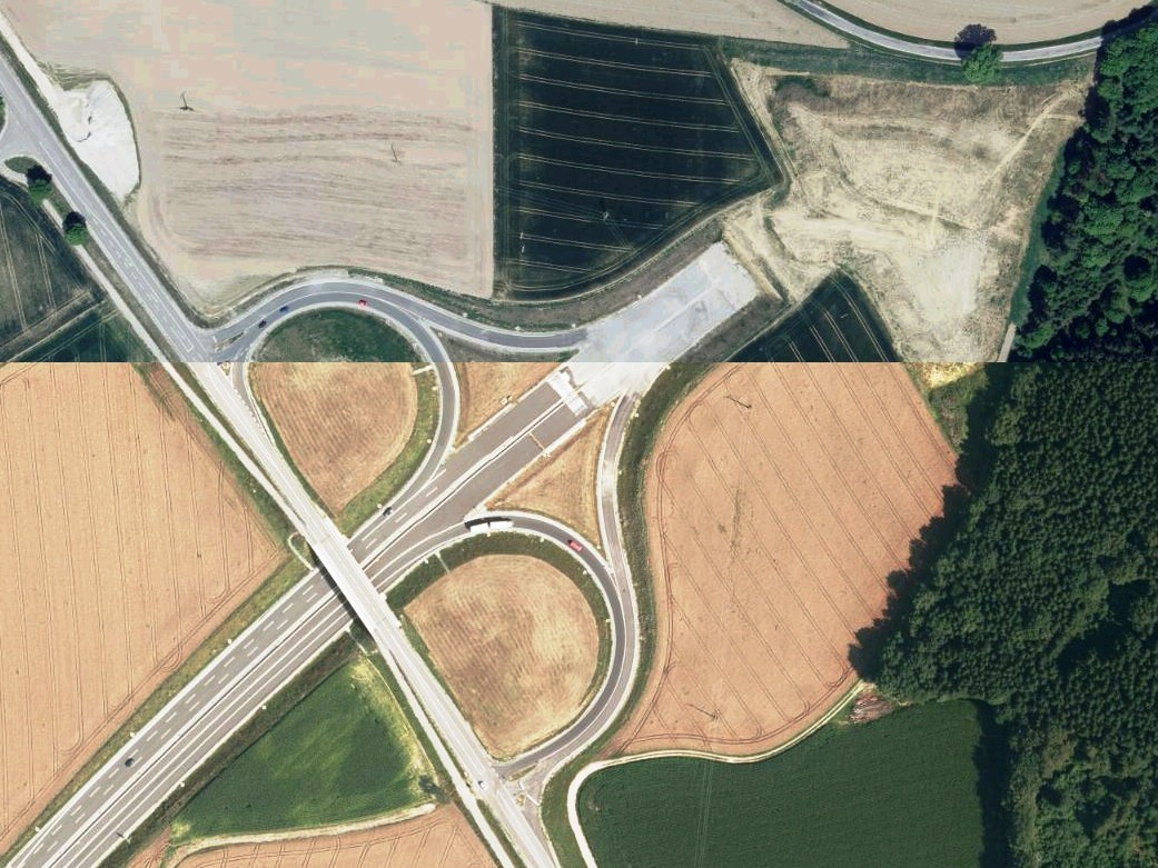 Luftaufnahme der Bayerischen Vermessungsverwaltung: Autobahnende der BAB 94 in Pastetten, Bayern, im Jahr 2012